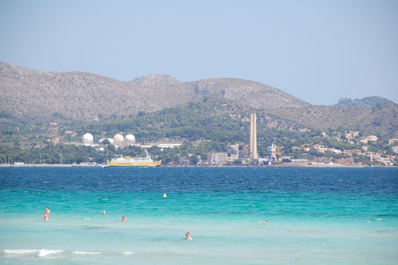 Mallorca - Port Alcudia